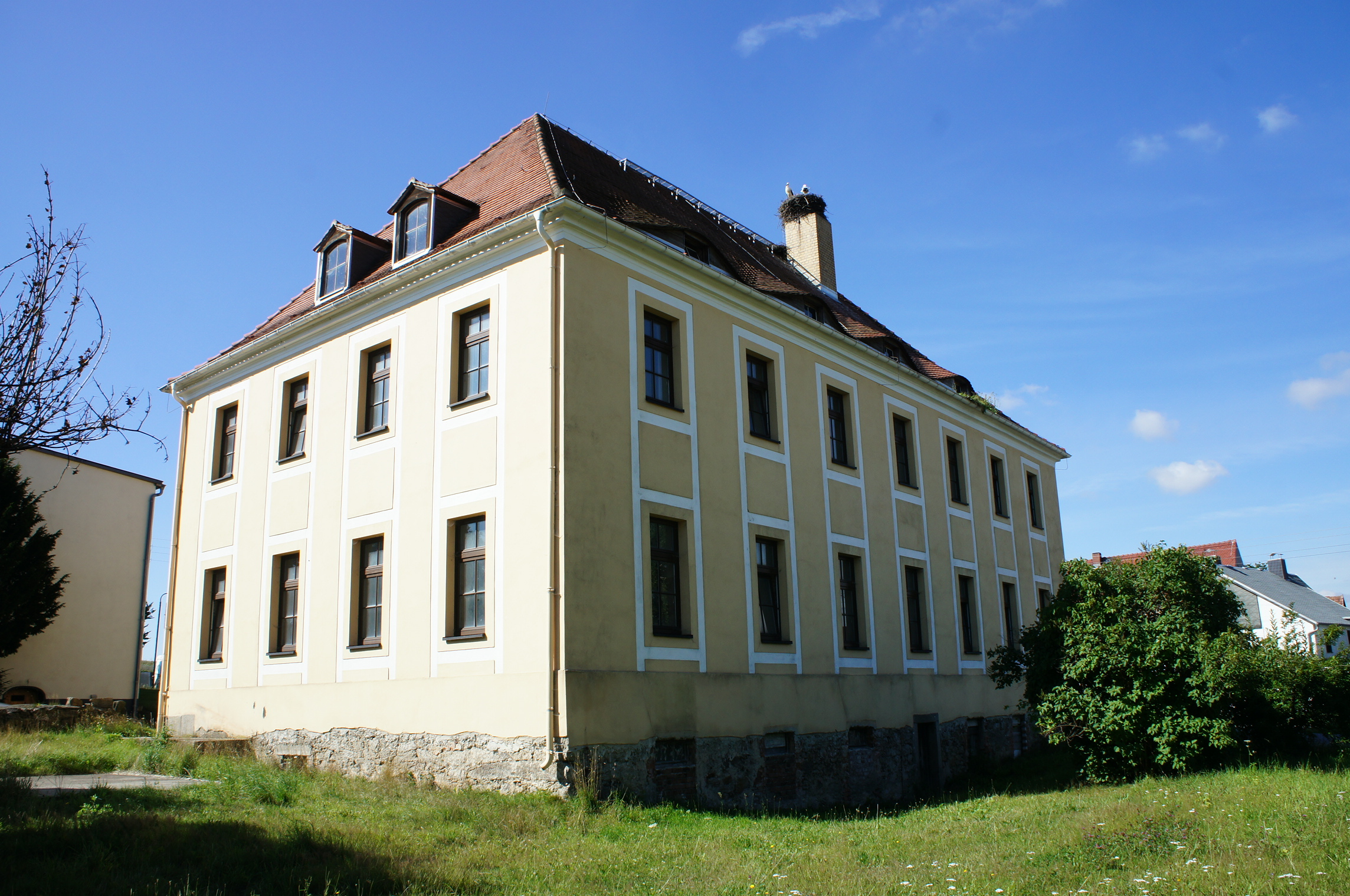 Rittergut Loga, Nr. 24/24 a, 02633 Neschwitz, OT Loga. Ein Herrensitz ist 1280 erwähnt, vermutlich handelt es sich um das 1550 erwähnte Rittergut. Bis 1622 im Besitz der Familie von Luttitz, verkauft u.a. an die von Zezschwitz, 1656 an Hans Caspar von Haugwitz. Nach der Enteignung der damaligen Besitzer 1945 wurden das Gebäude als Kinderkrippe und -garten genutzt. Das Herrenhaus ist saniert und momentan leerstehend. Nord/Ostseite